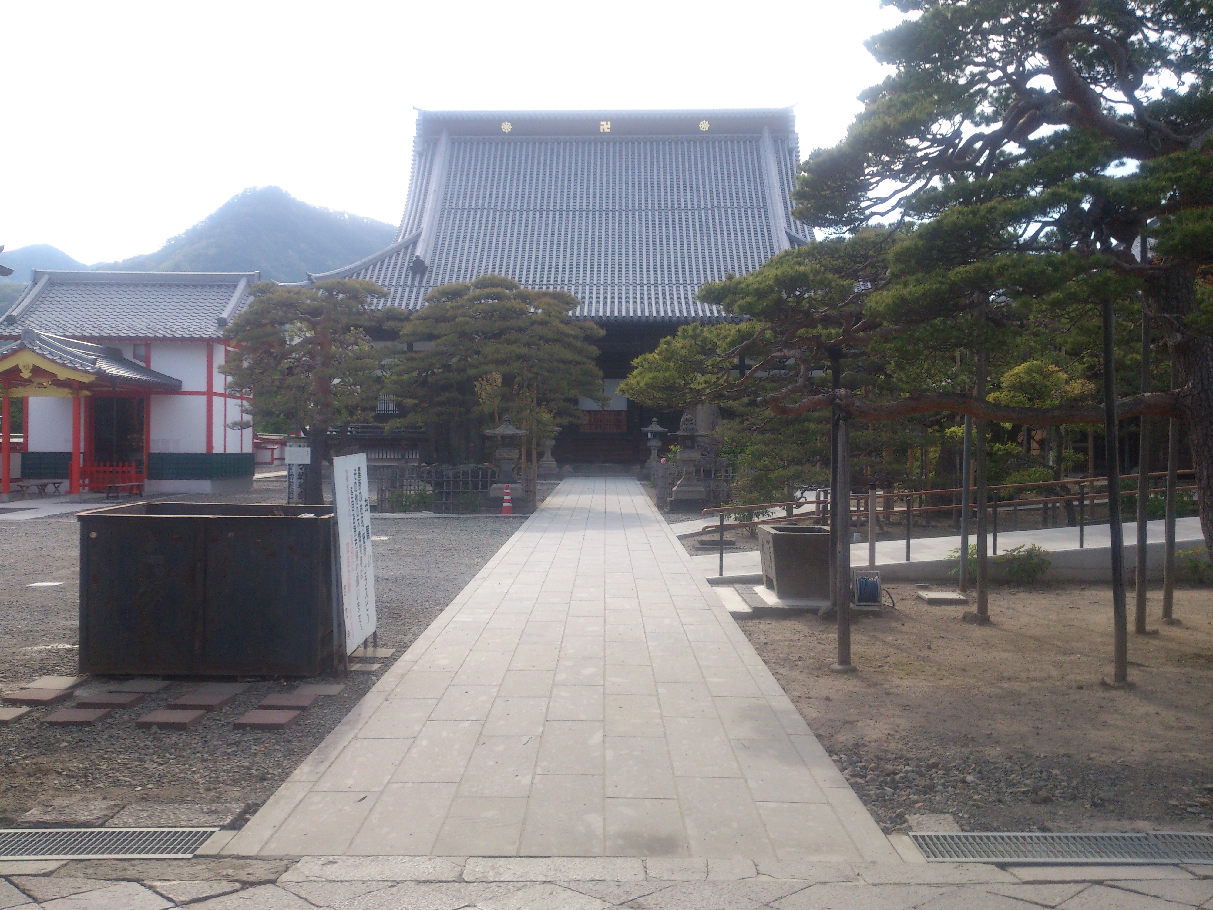 西方寺（長野県長野市西町）